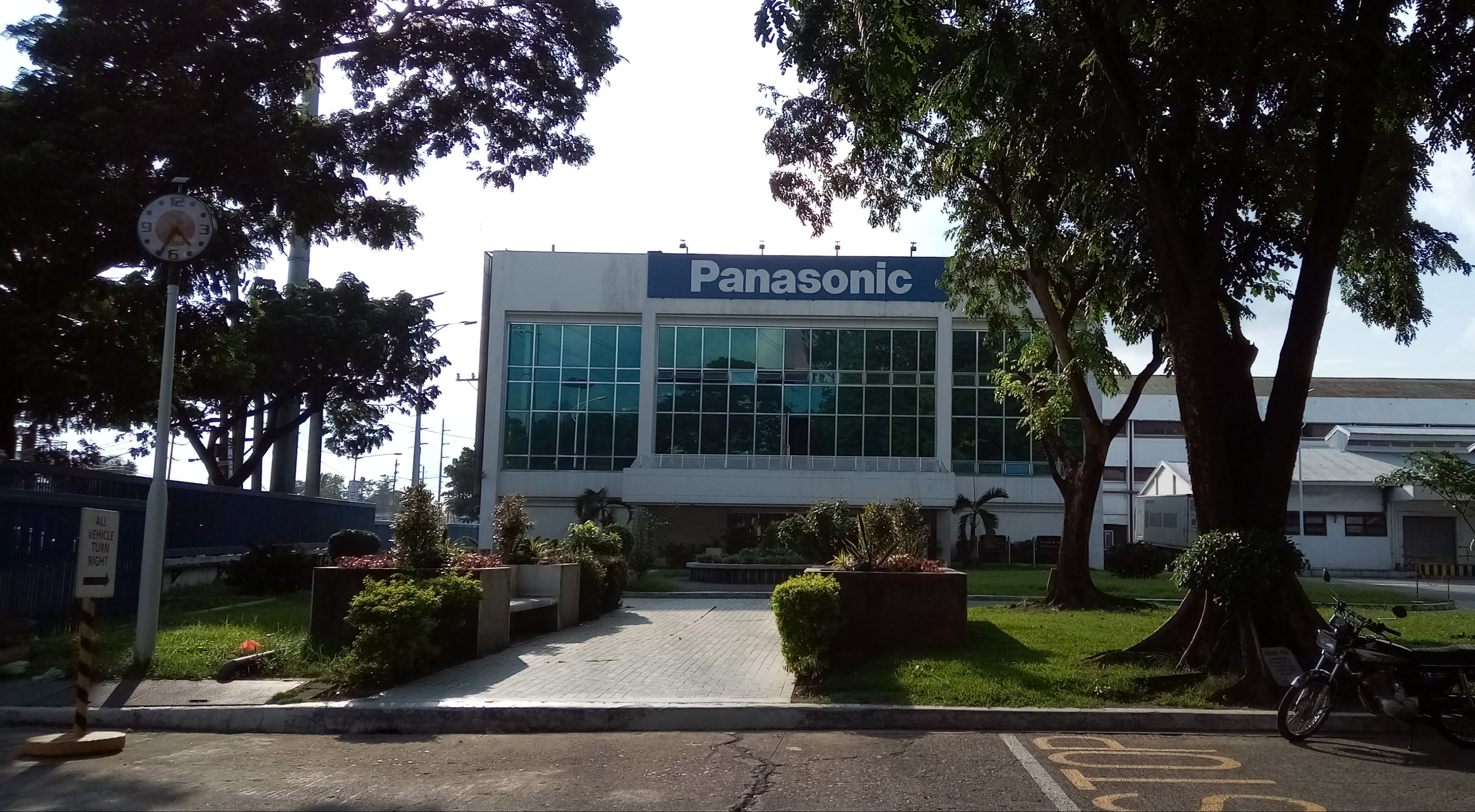 Bikol Central: Sarong establishimento sa laog kan Panasonic Philippines sa Taytay, Rizal Filipinas.